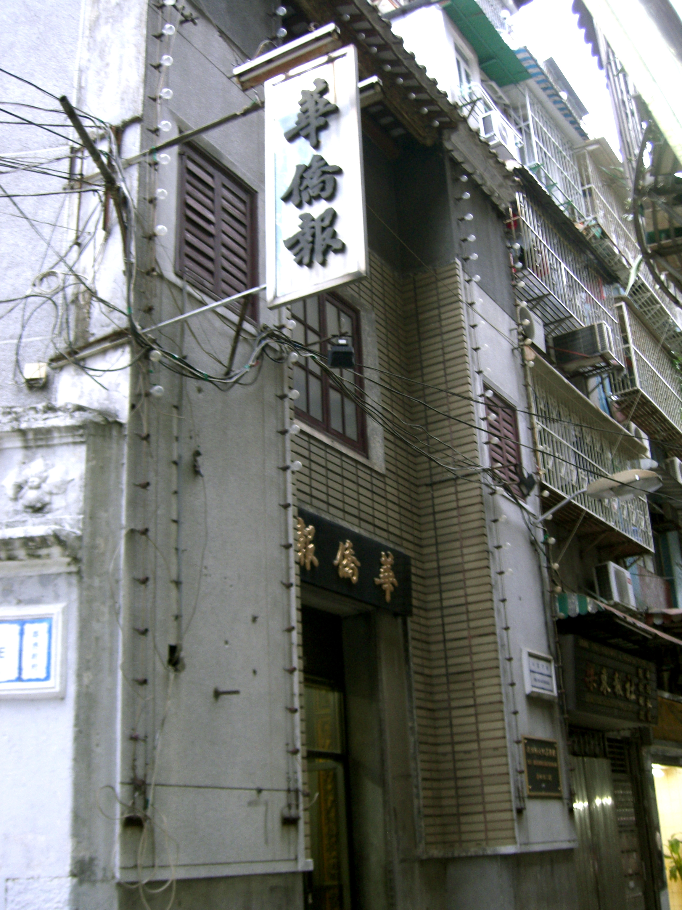 Jornal Va Kio